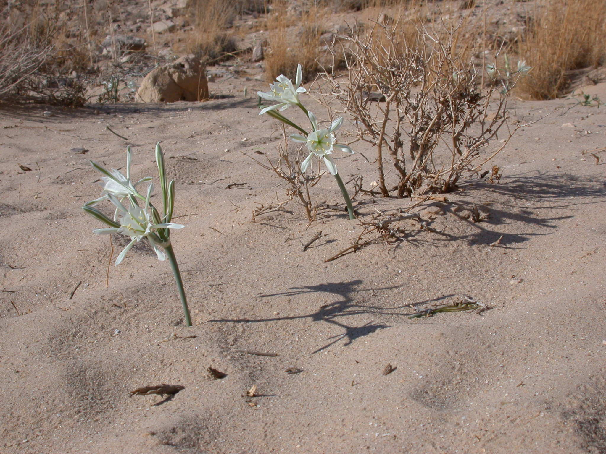 Pancratium sickenbergeri Aschers. & Schweinf. ex C. & W. Barbey (חבצלת הנגב), Northern Negev (Near Ein Yorkeam), Israel, October 28, 2006.